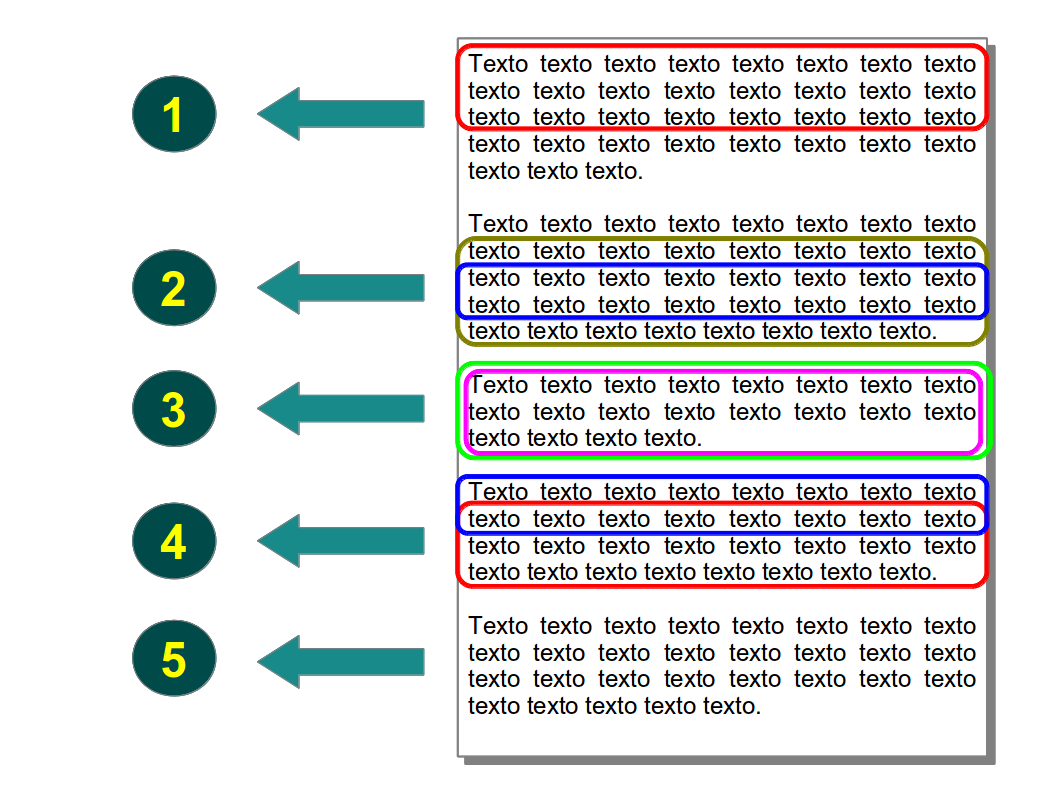 Análise de contido. Relacións entre as categorías.